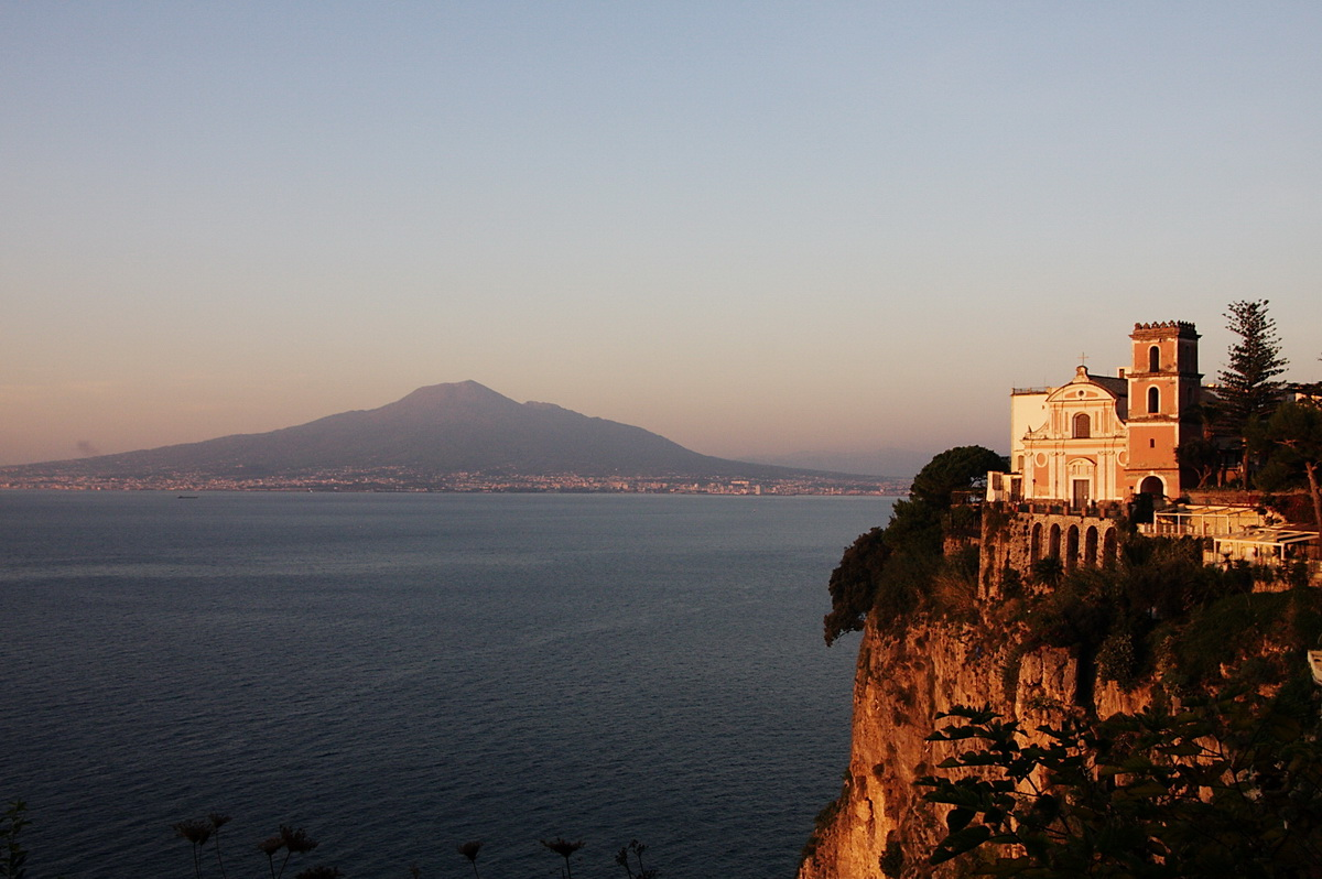 Església de l'Anunzziatta a Vico Equense (Campania - Itàlia)